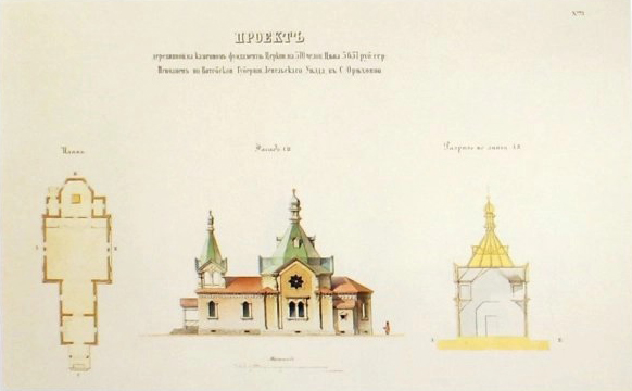 Беларуская (тарашкевіца): Арэхаўна (Arechaŭna). Пятніцкая царква-мураўёўка, праект